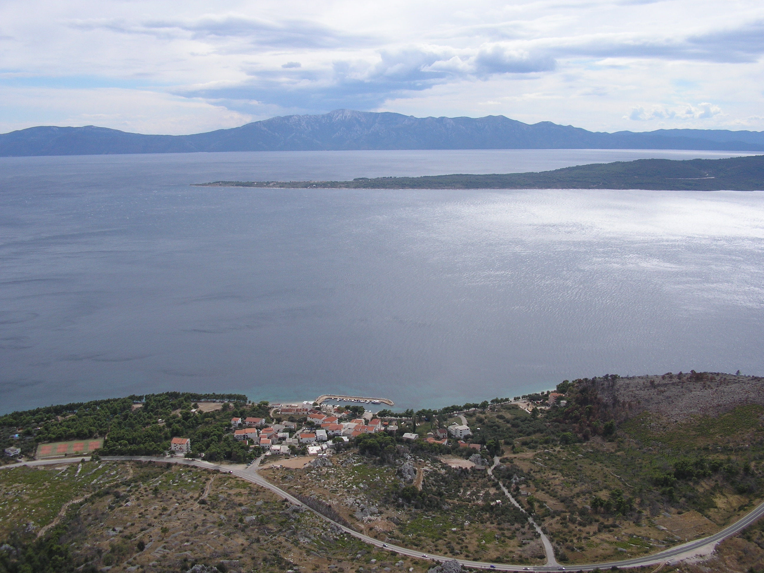 Živogošće-Blato